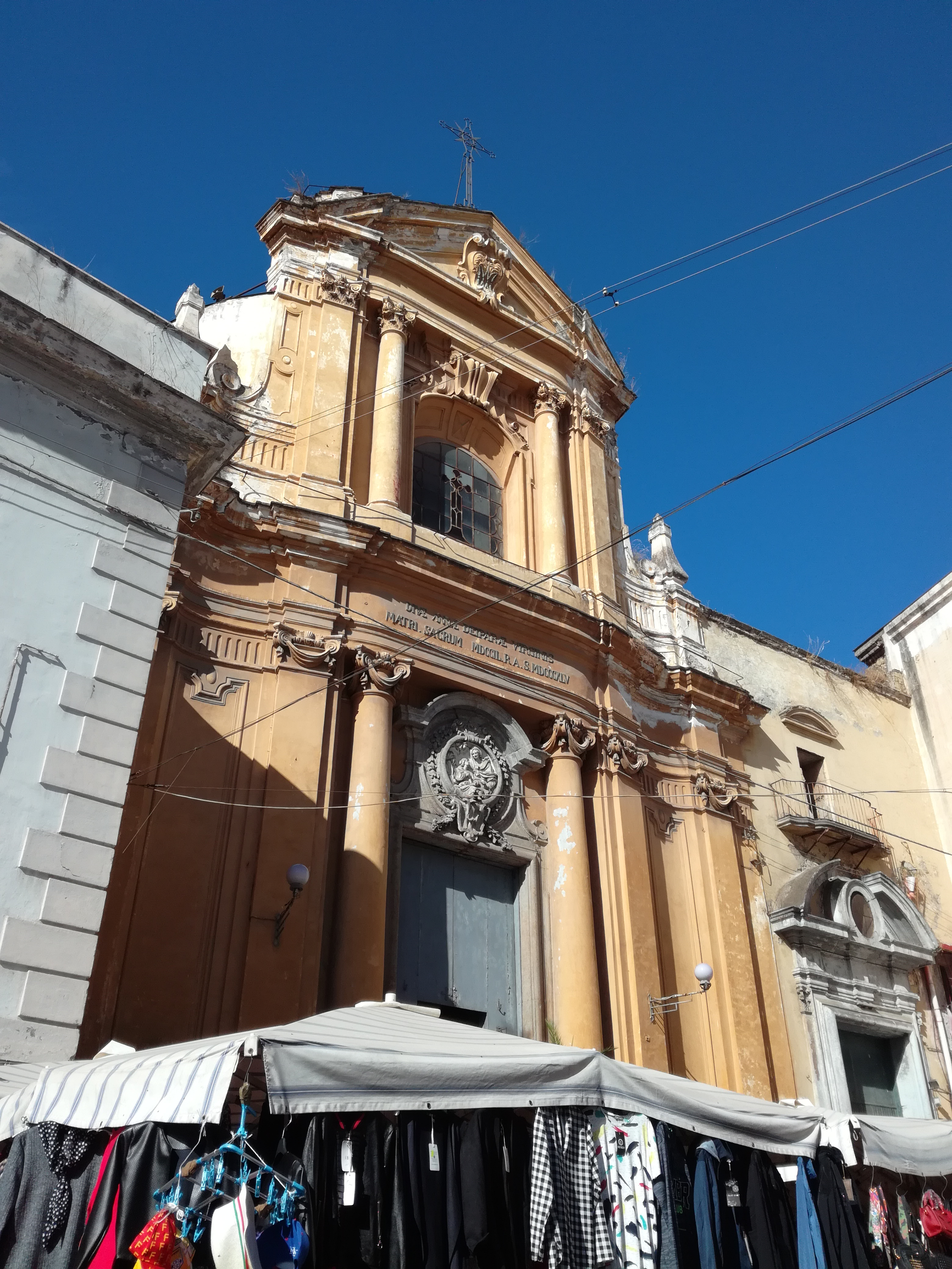 Esterno di Sant'Anna a Capuana (Napoli)